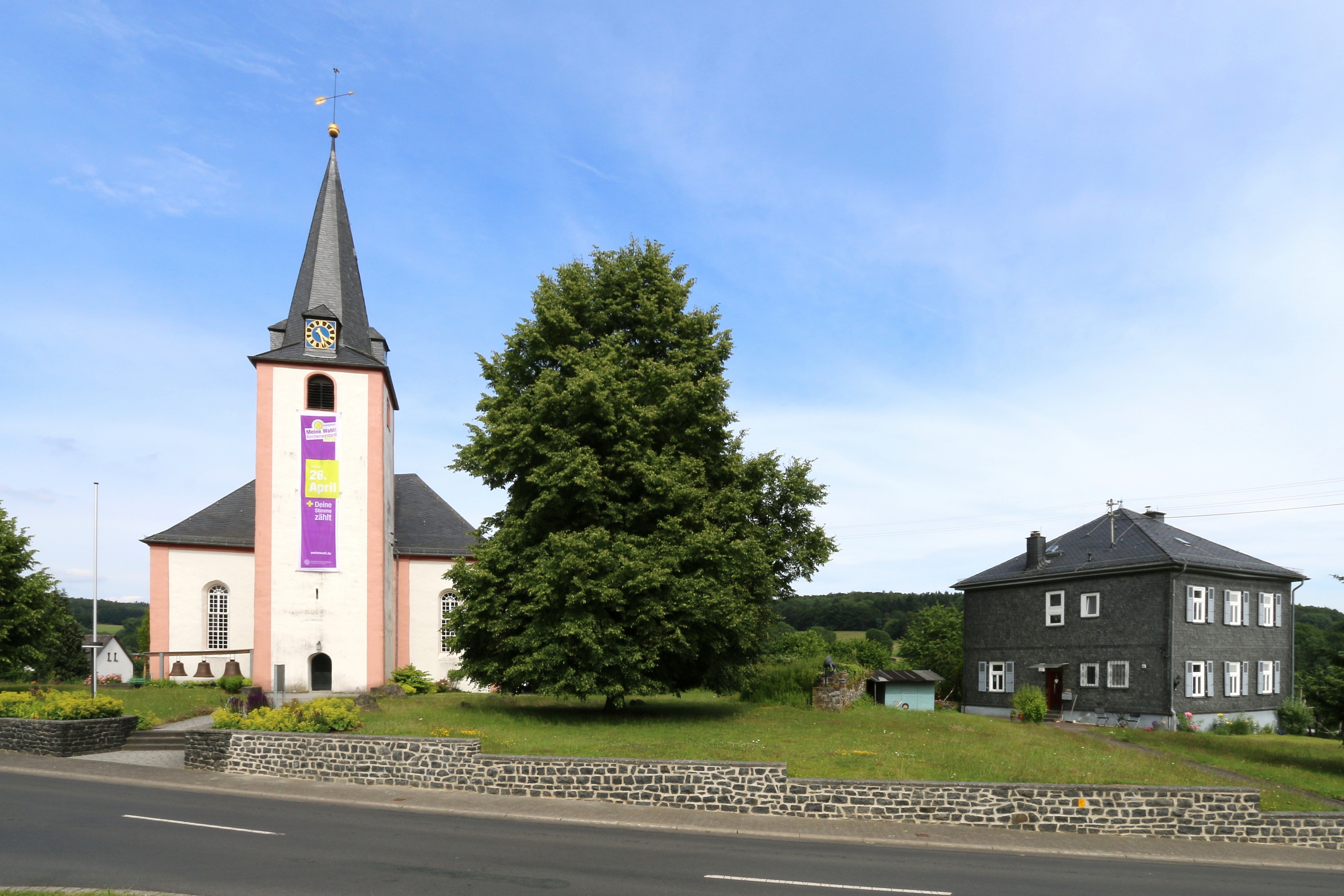 Neunkirchen, Westerwaldkreis: Katholische Filialkirche Mariä Geburt This is a photograph of an architectural monument.It is on the list of cultural monuments of Neunkirchen